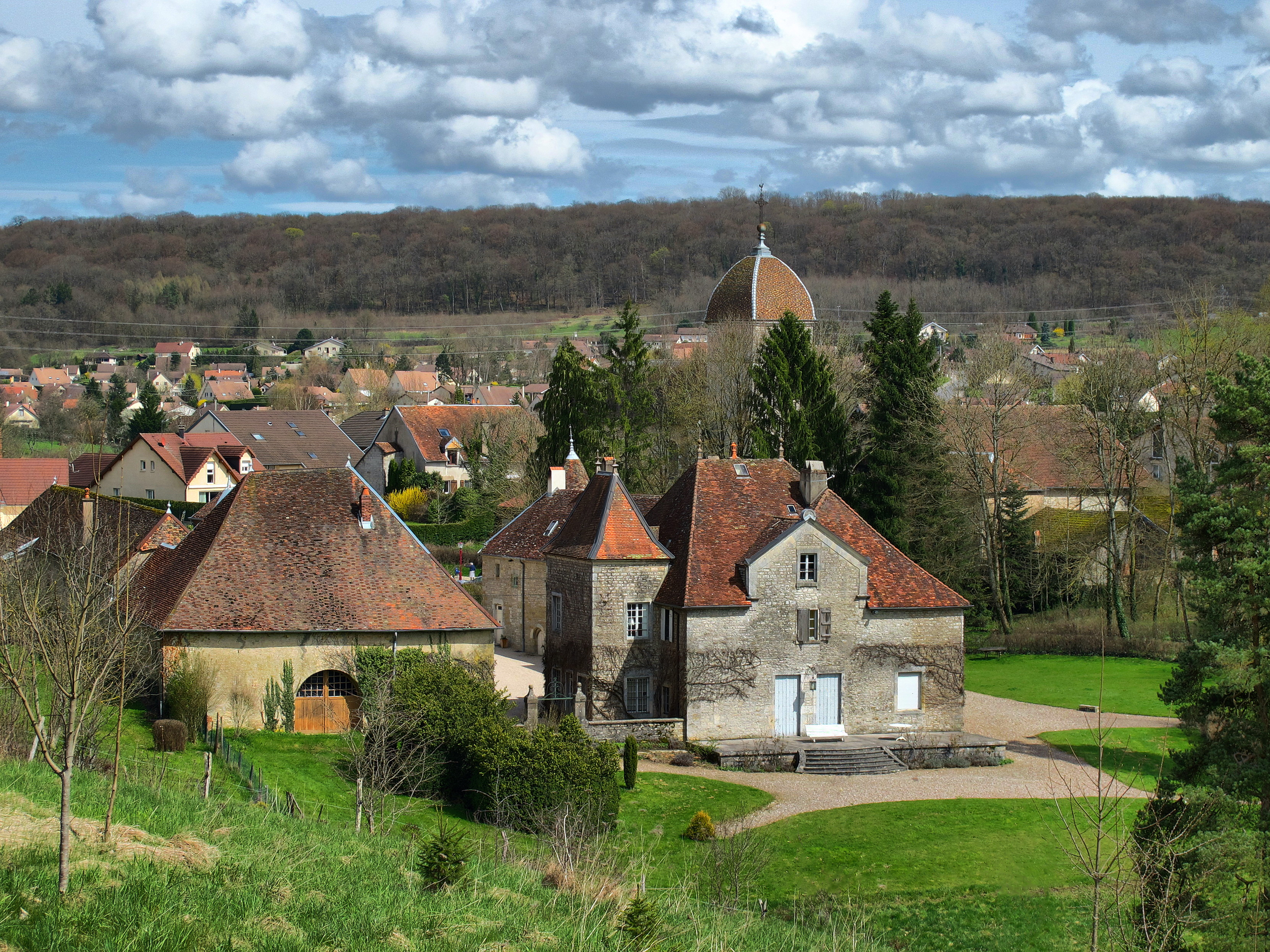 Inscrit aux monuments historiques sous le numéro PA00132846